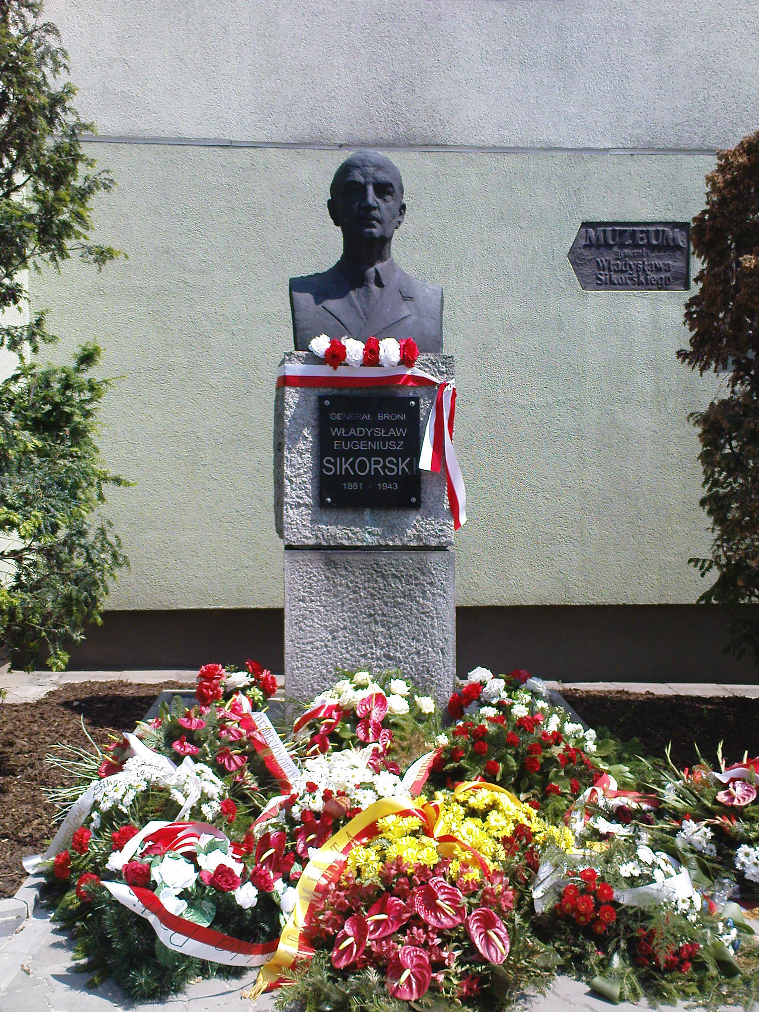 Popiersie generała Władysława Sikorskiego przy ulicy Belwederskiej róg Tureckiej na Mokotowie - upamiętniające miejsce zamieszkania oraz lokalizację Muzeum poświęcone generałowi